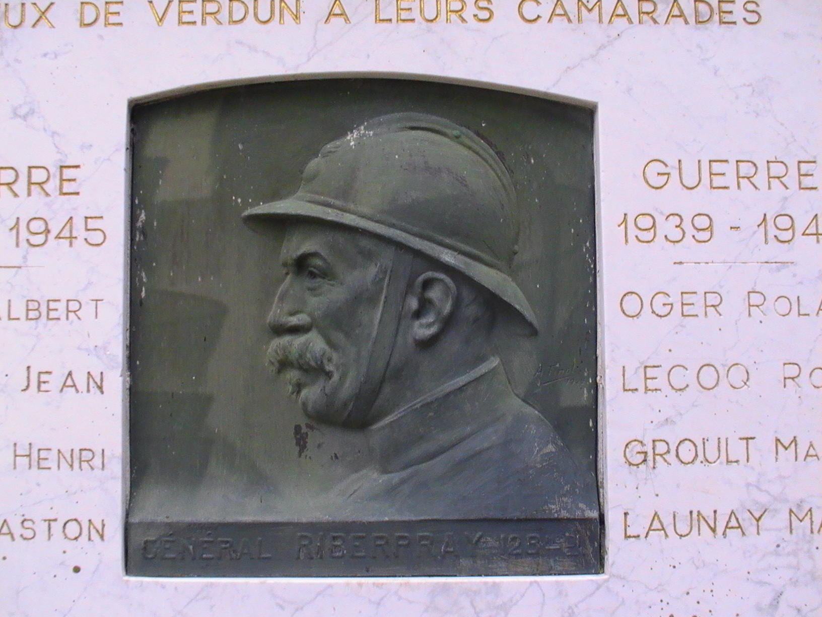 Général Georges Riberpray - Gaillon - détail du monument aux morts